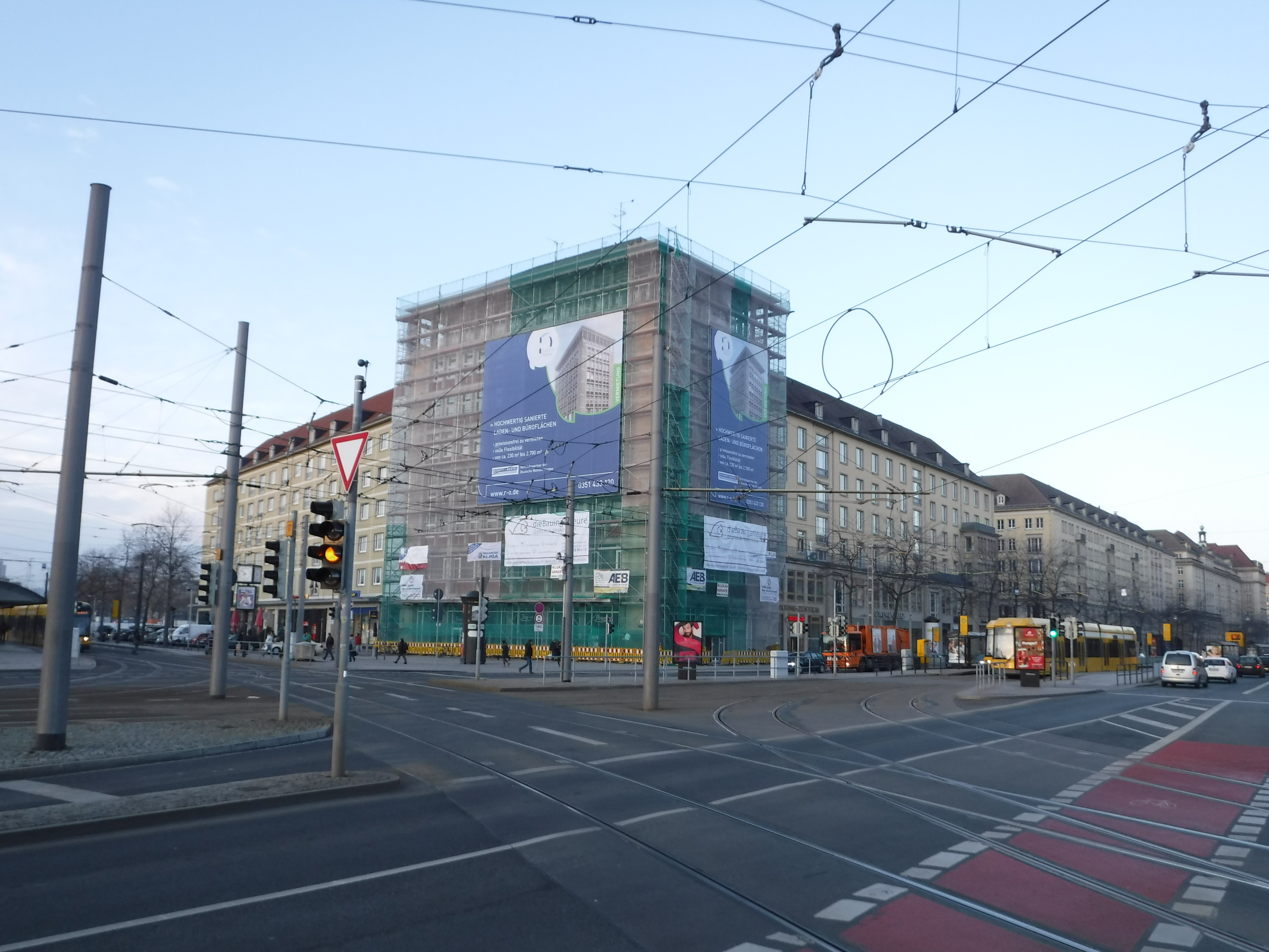 Haus Wilsdruffer Straße 3 am Pirnaischen Platz in Dresden während des Umbaus 2016